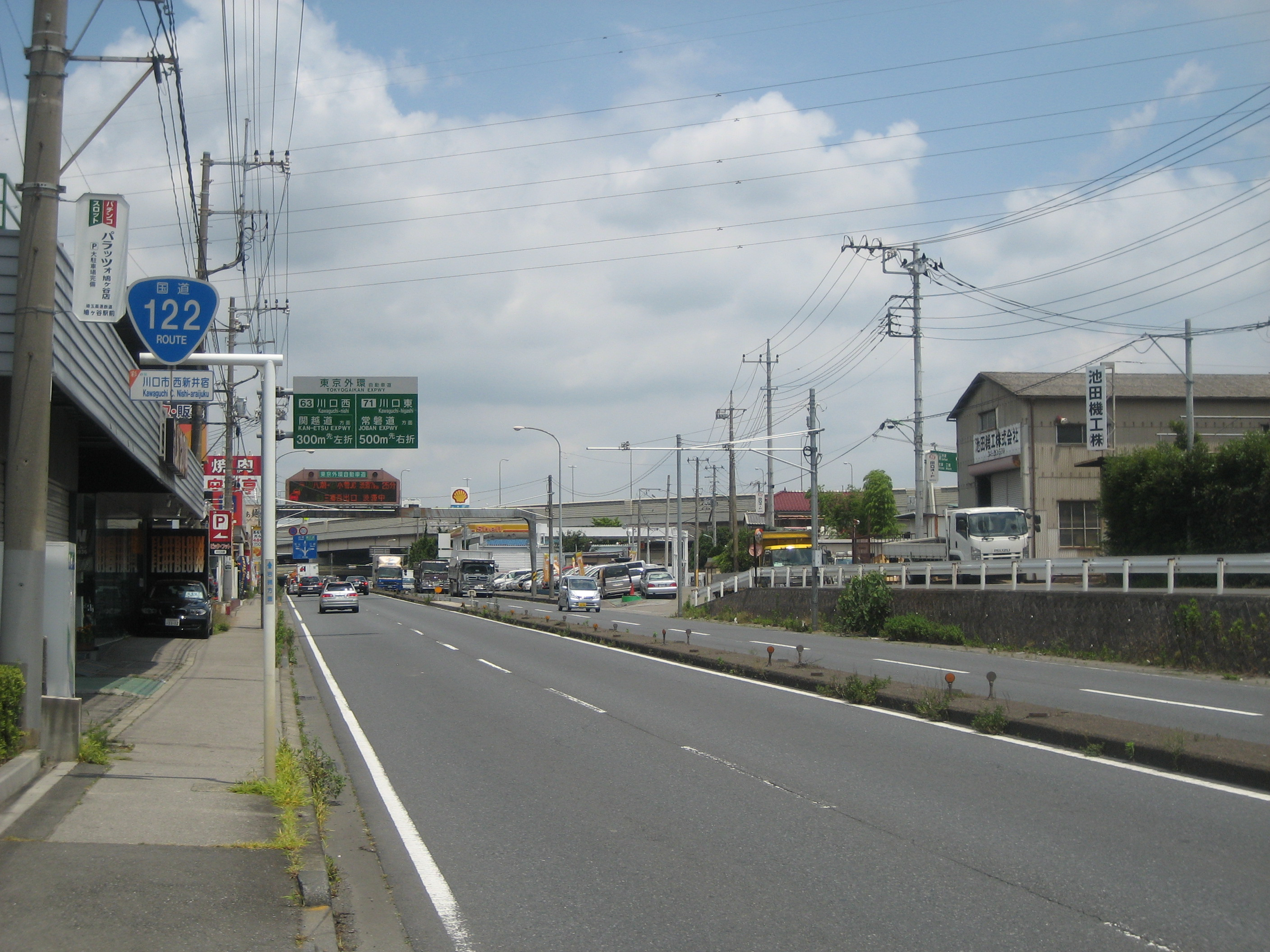 国道１２２号線埼玉県川口市西新井宿付近川口JCT方面を撮影